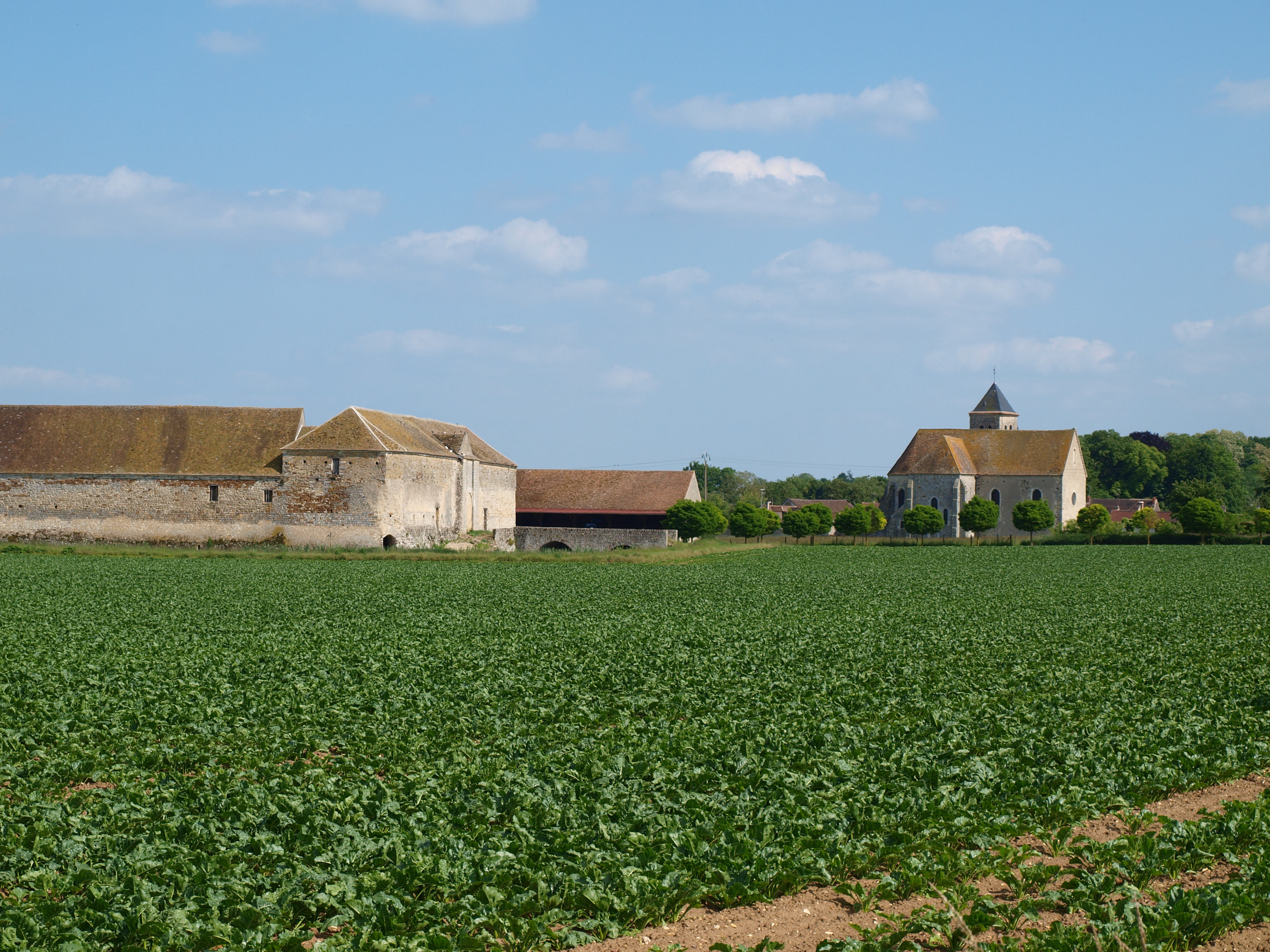 Château d'Esmans (Seine et Marne, France)